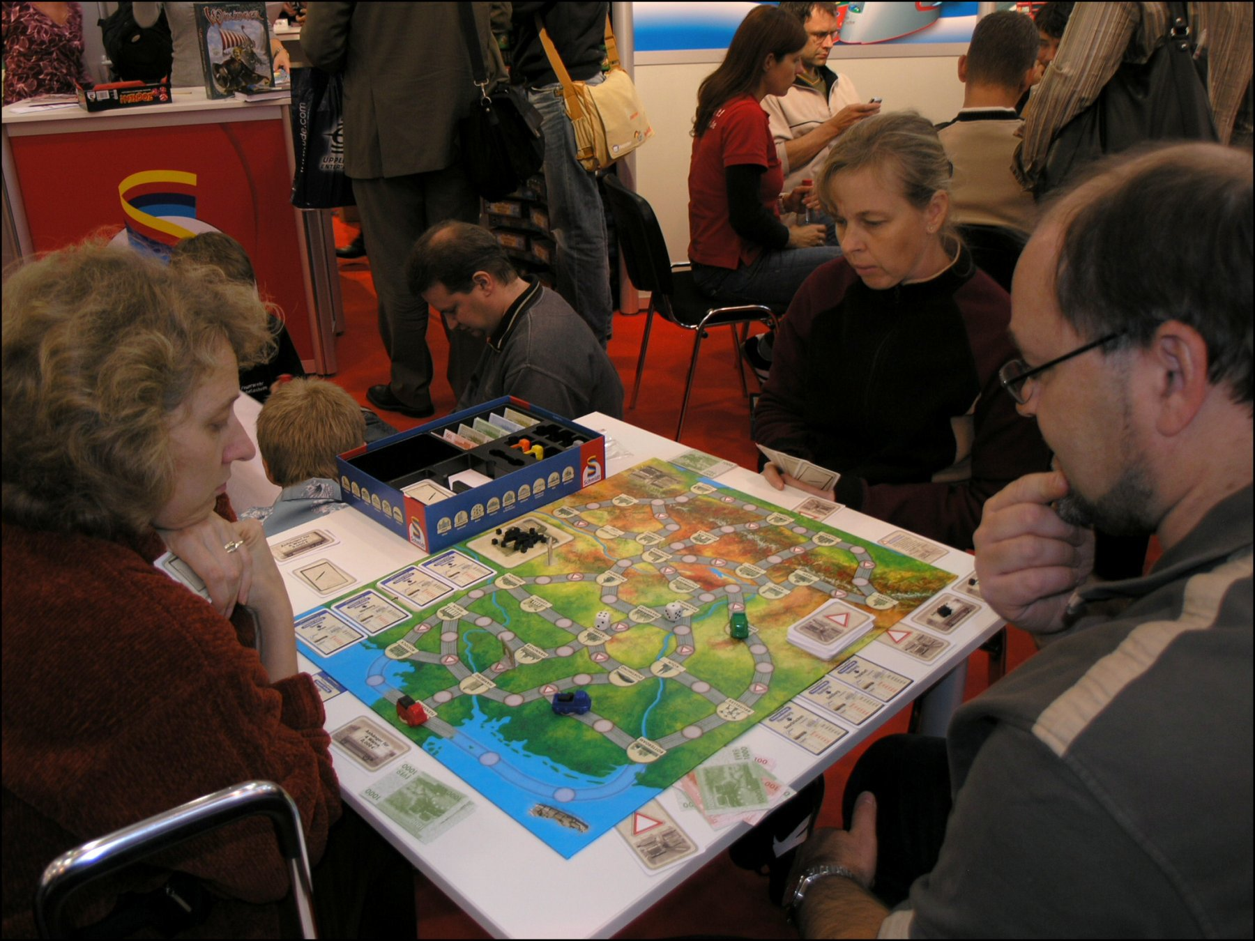 Auf Achse (Essen Spiel'07)